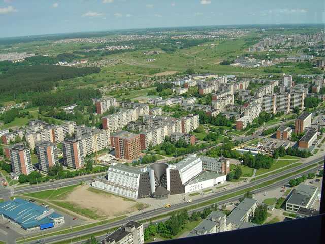 Foto: utsikt från TV-tornet i Vilnius, tagen av mig själv.